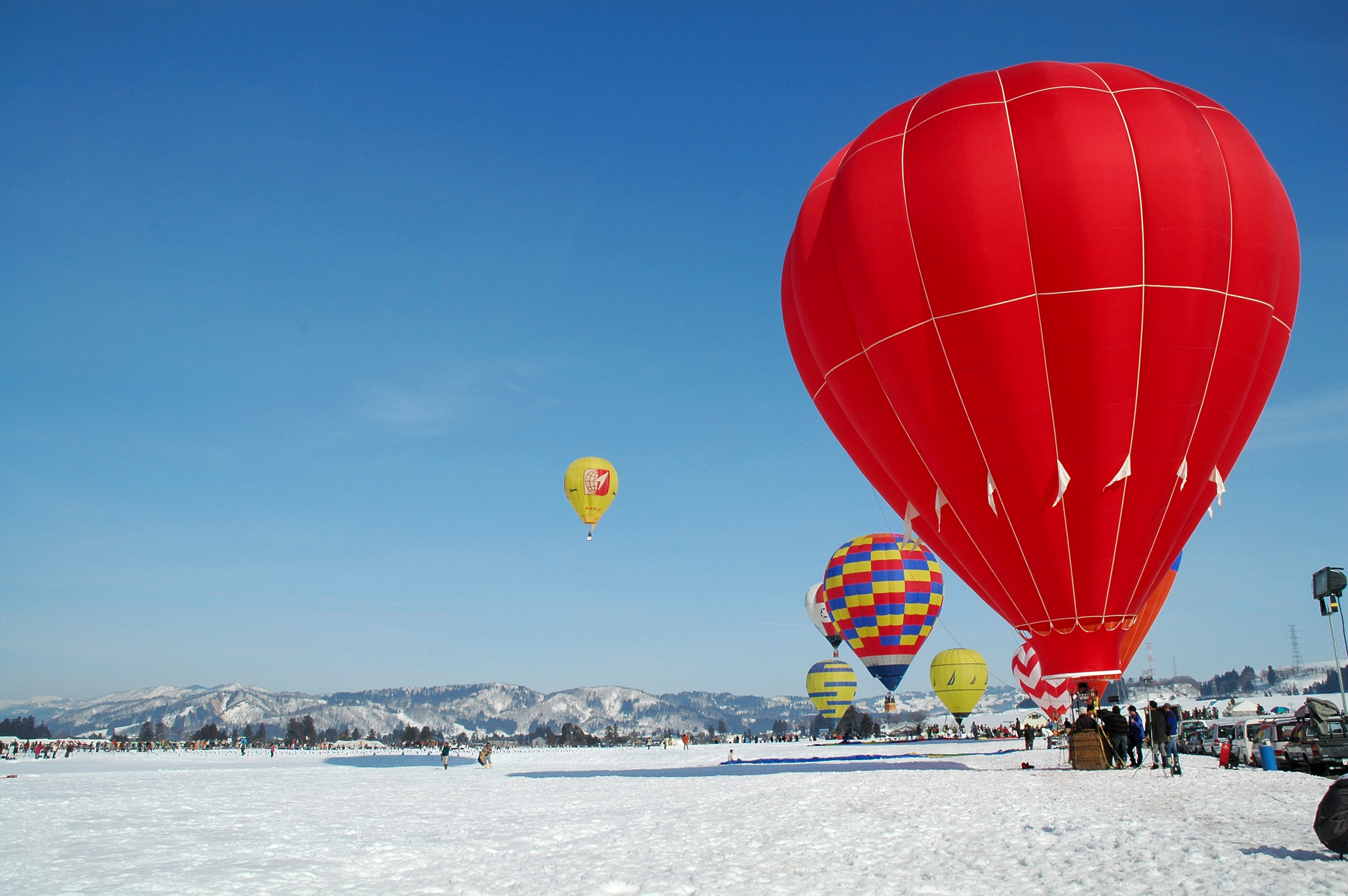 2006 Ojiya Balloon Festival (2006年おぢや風船一揆)